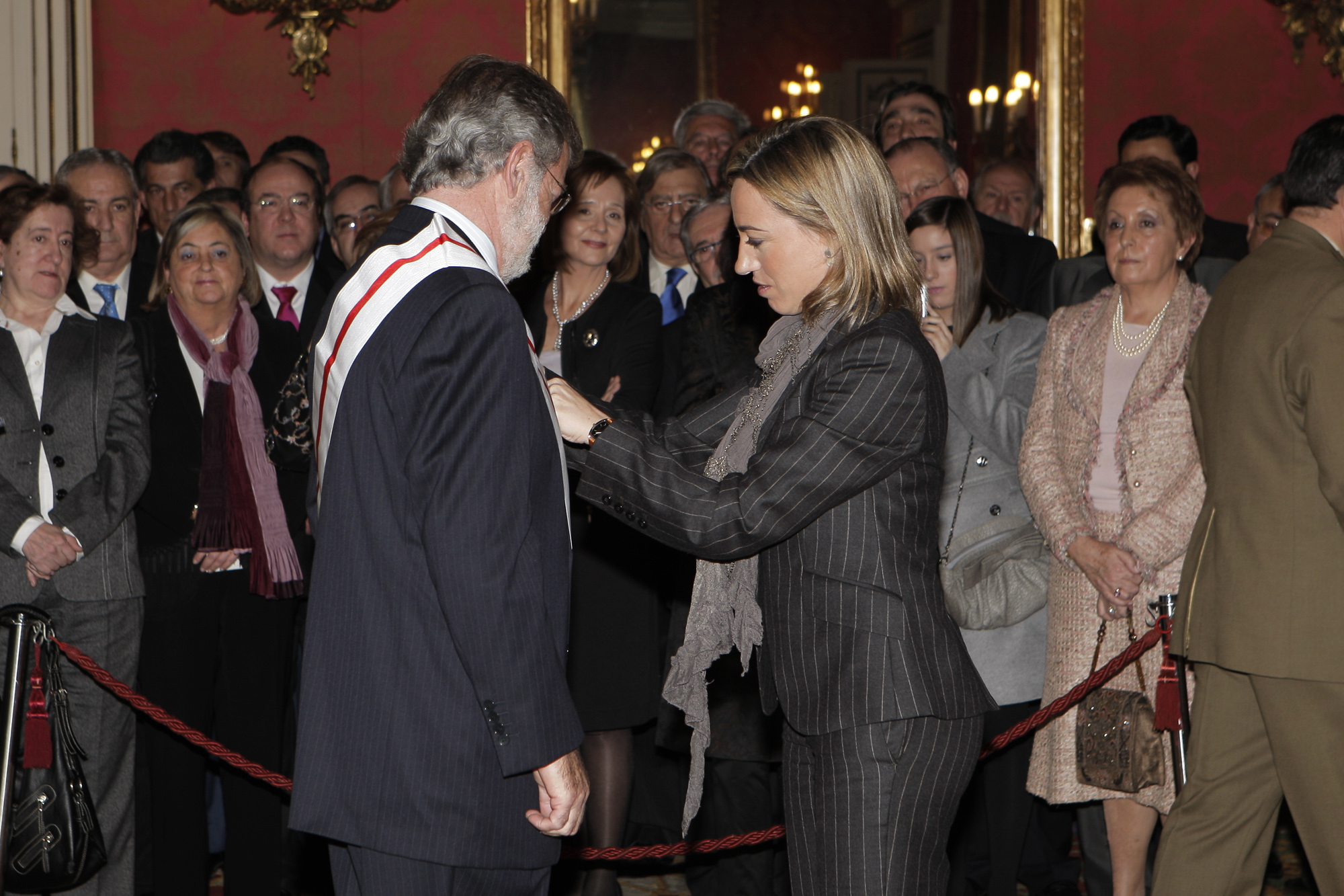 La ministra de Defensa, Carme Chacón, impone, 26 de enero de 2010, la Gran Cruz al Mérito Militar al ex presidente de la Junta de Extremadura, Juan Carlos Rodríguez Ibarra.